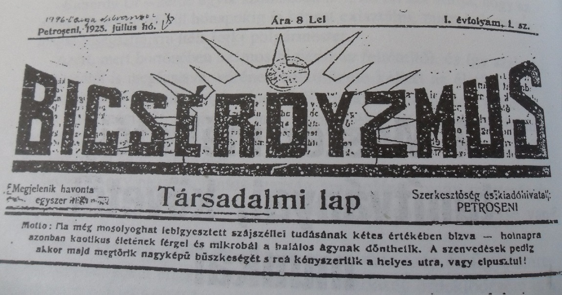 A Bicsérdyzmus című rövid életű havilap eleje (1925. július)